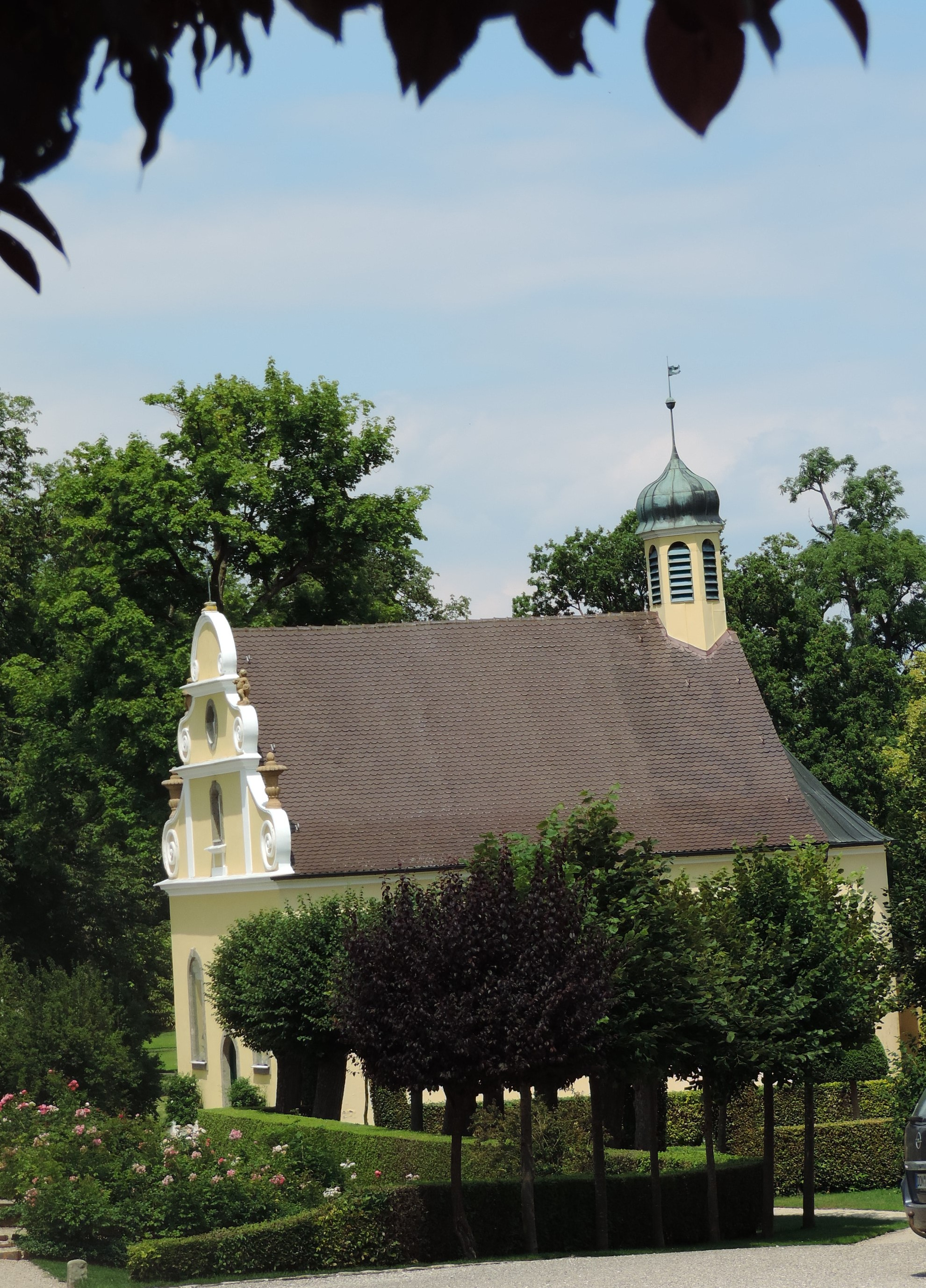 Schloss Hohenaltheim, Kapelle